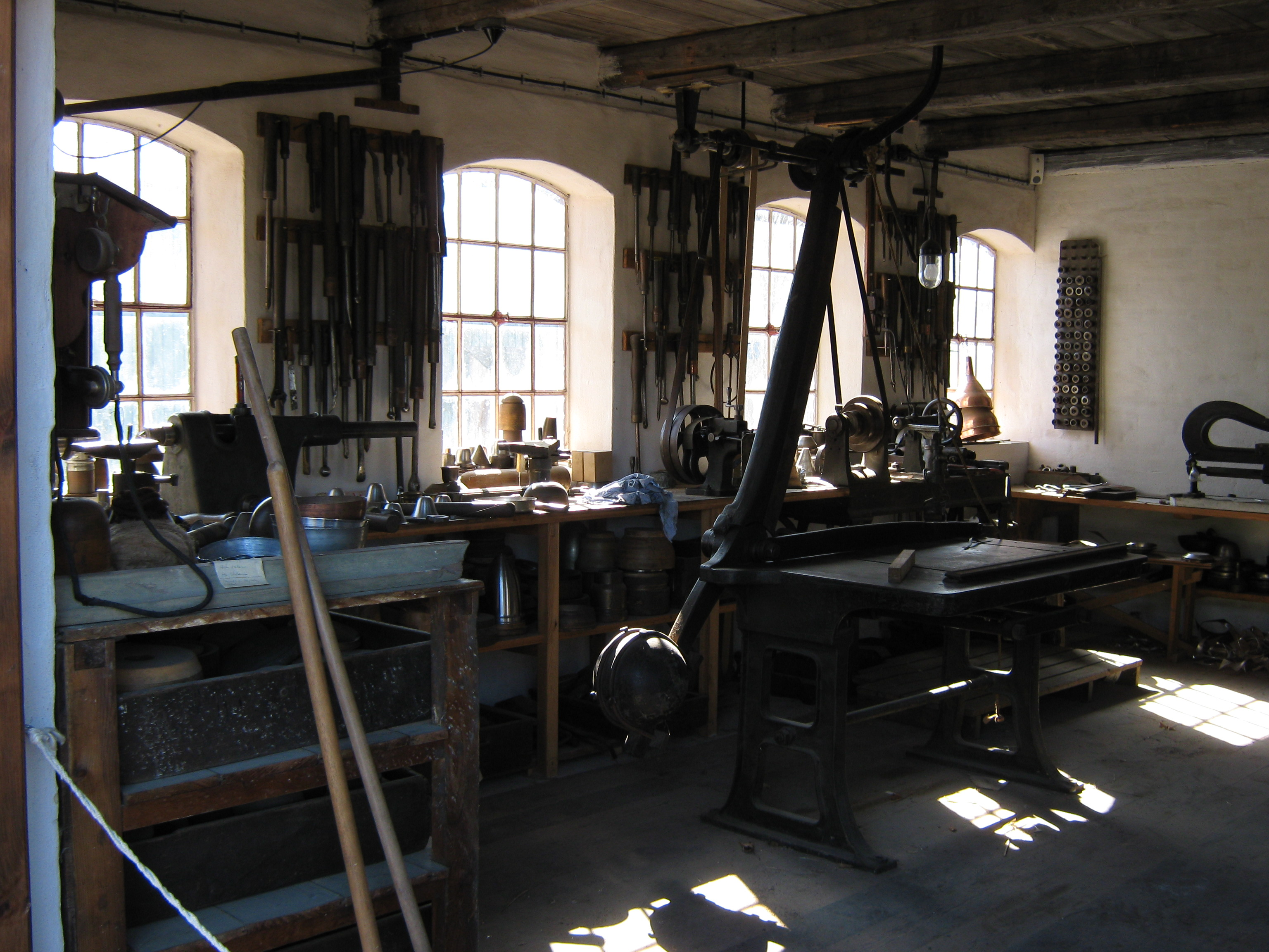 Smedeværksted fra Rynkeby. Metaltrykkeriet. Frilandsmuseet.